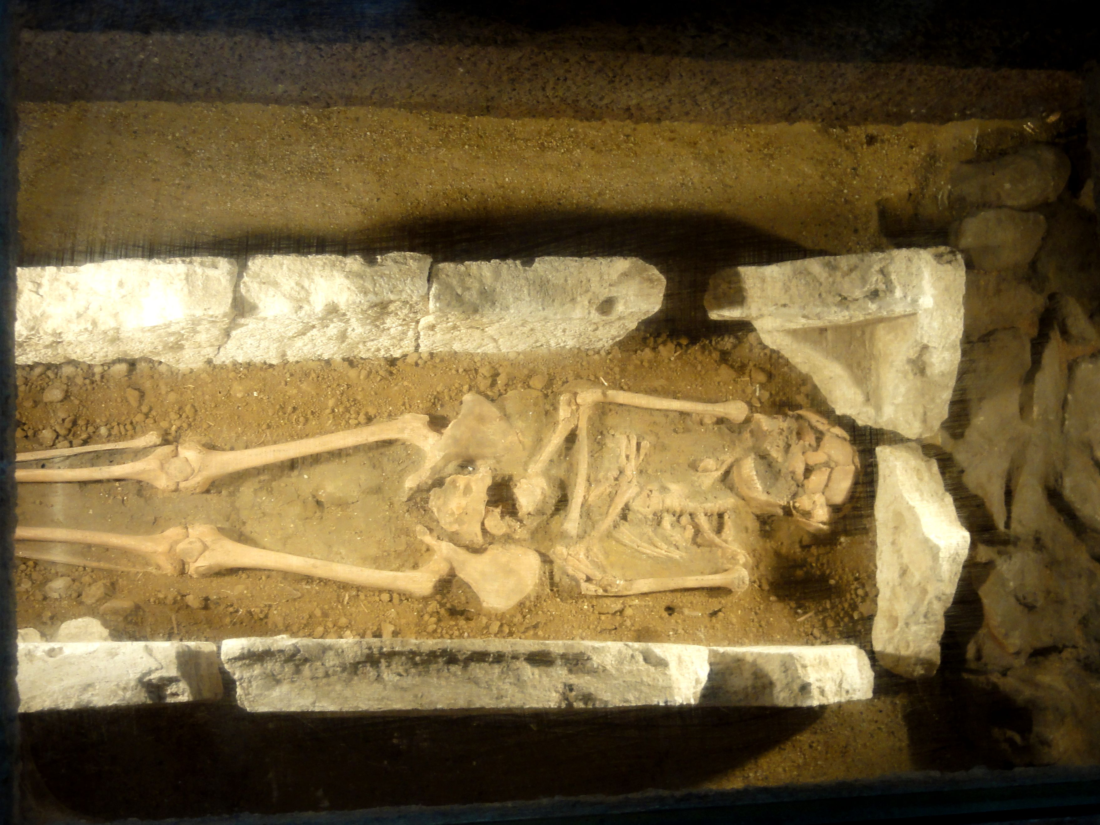 Collatéral sud (faux croisillon), sarcophage au sous-sol.